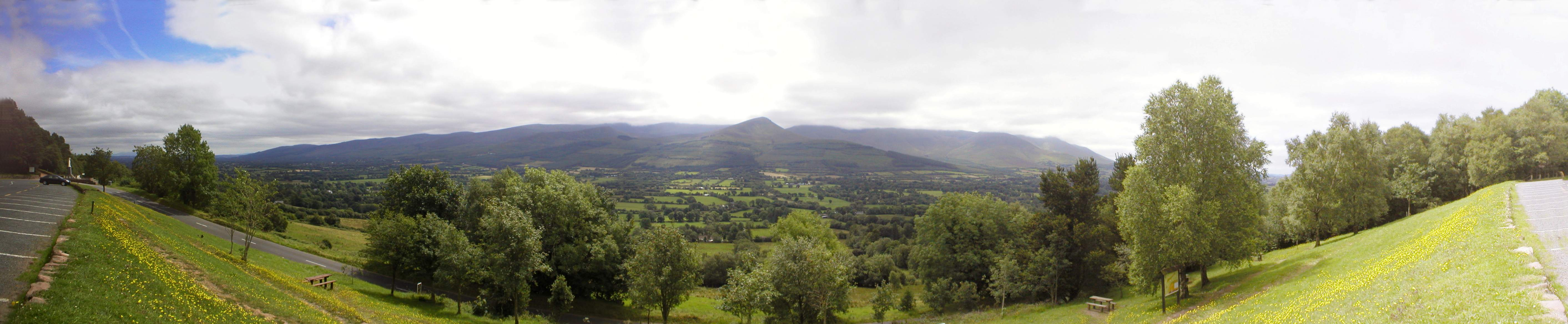 original digital image